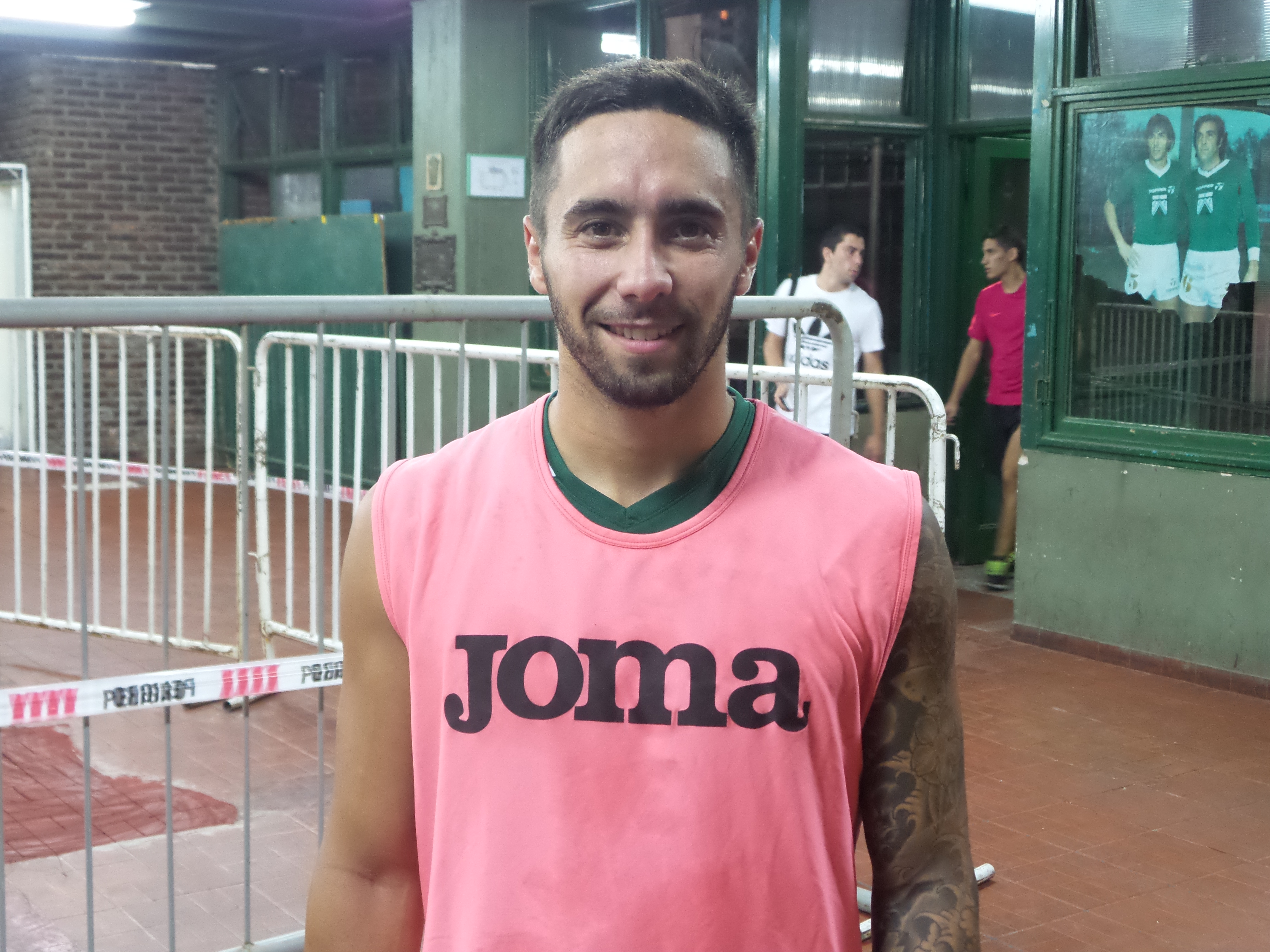 Nicolas Benavidez